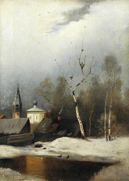 Ранняя весна